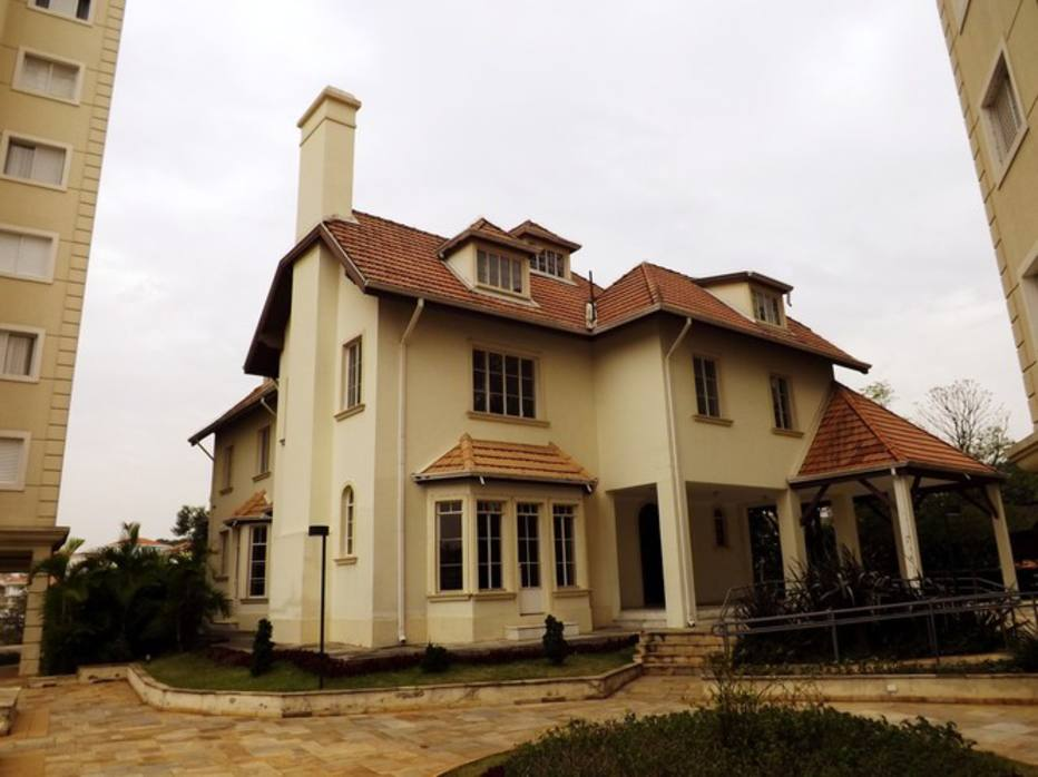 Castelinho